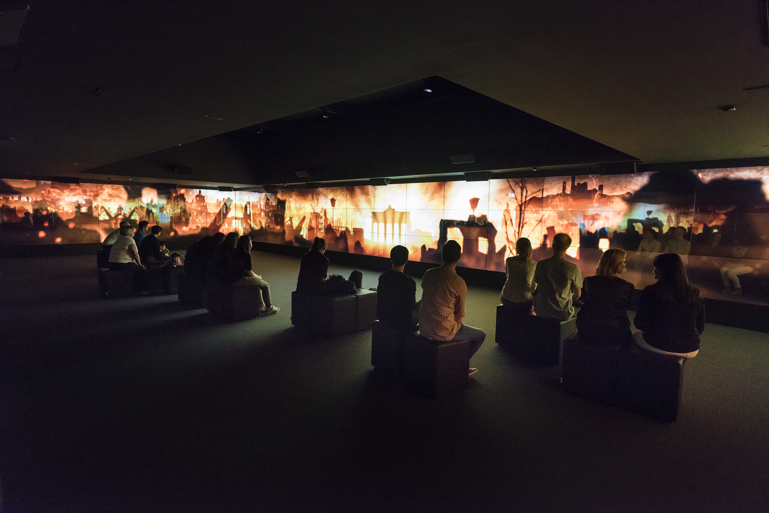 Foto aus dem Brandenburger Tor Museum